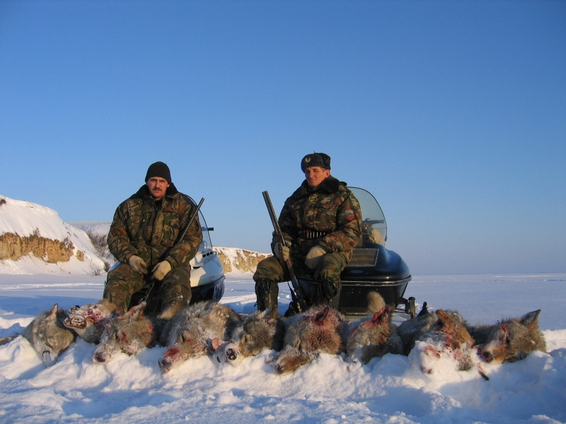 Убитые волки в Камышинском районе.